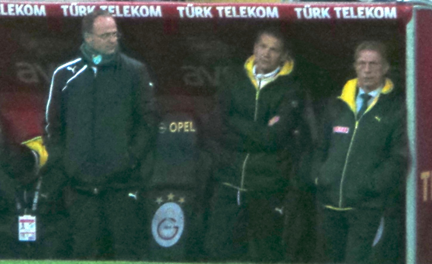 Daum Busaspor